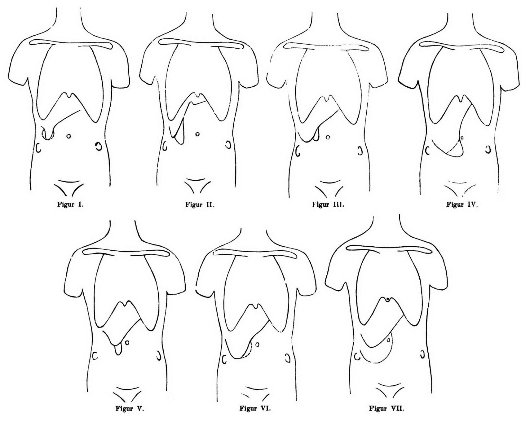 Die Skizzen aus der Originalpublikation von Bernhard Riedel 1888 zum nach ihm benannten Riedellappen der Leber.